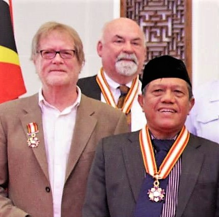 Verleihung des Ordem de Timor-Leste, 30. August 2014. Andrew Haydon Alcock (hinten), Peter Wesley-Smith (links) und Muchtar Pakpahan (rechts)